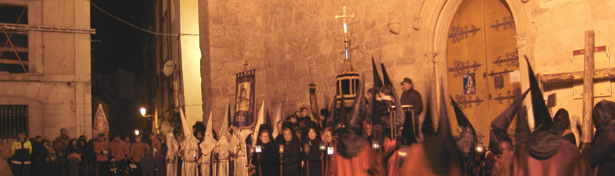 Procesión Sábado Santo, Nuestra Señora de la Soledad, Entrada iglesia de Santa Gadea, Burgos, España